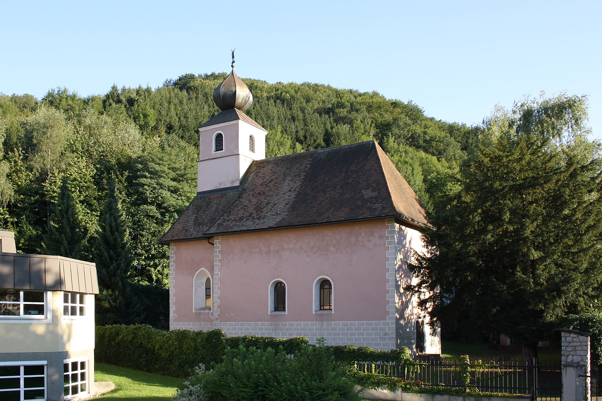 Johanneskirche in der niederderösterreichischen Marktgemeinde Traisen